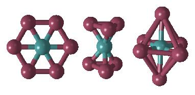 Hexagon, trigonální prizma a okaedr